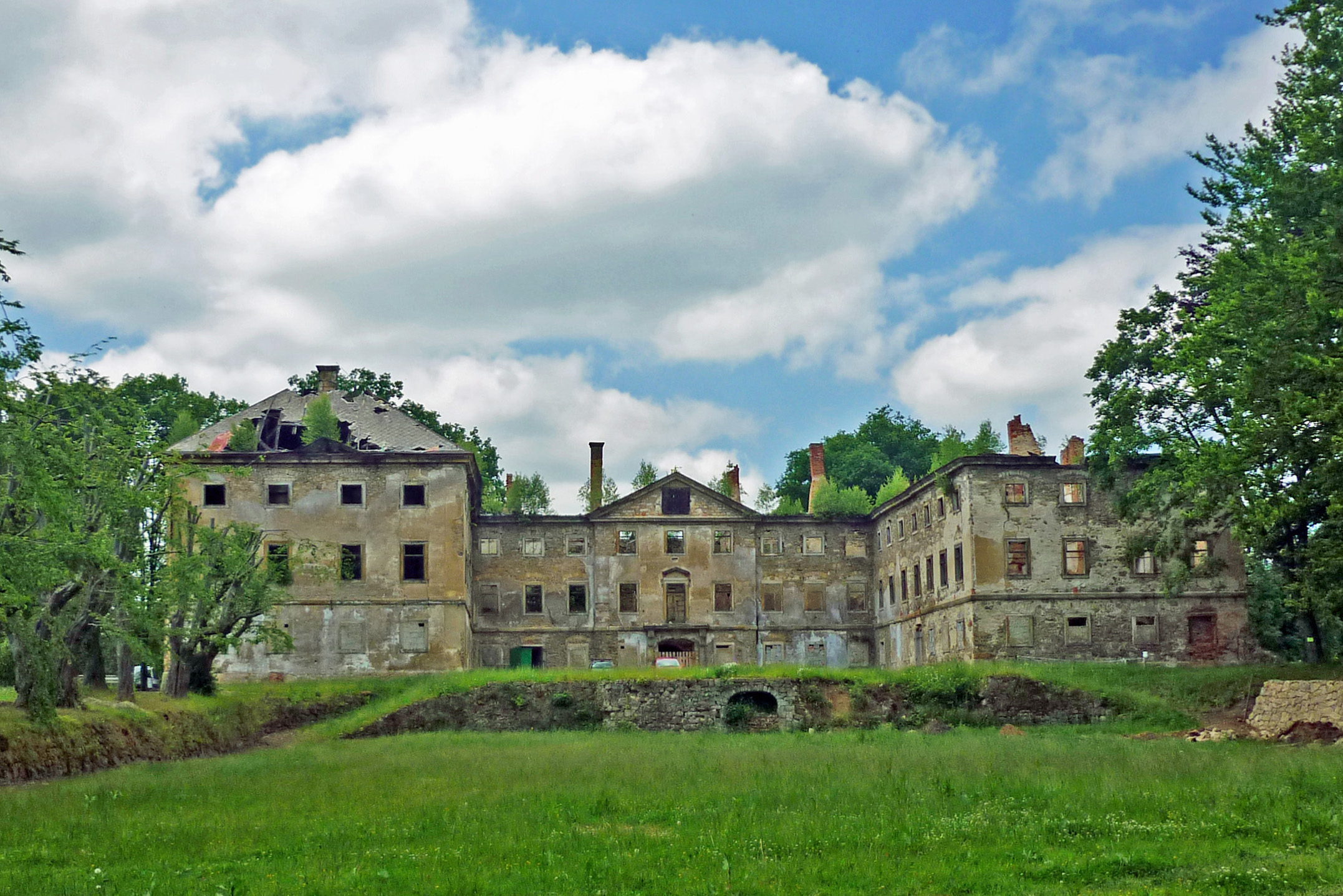 Schlossruine in Hainspach (Lipová) in Nordböhmen